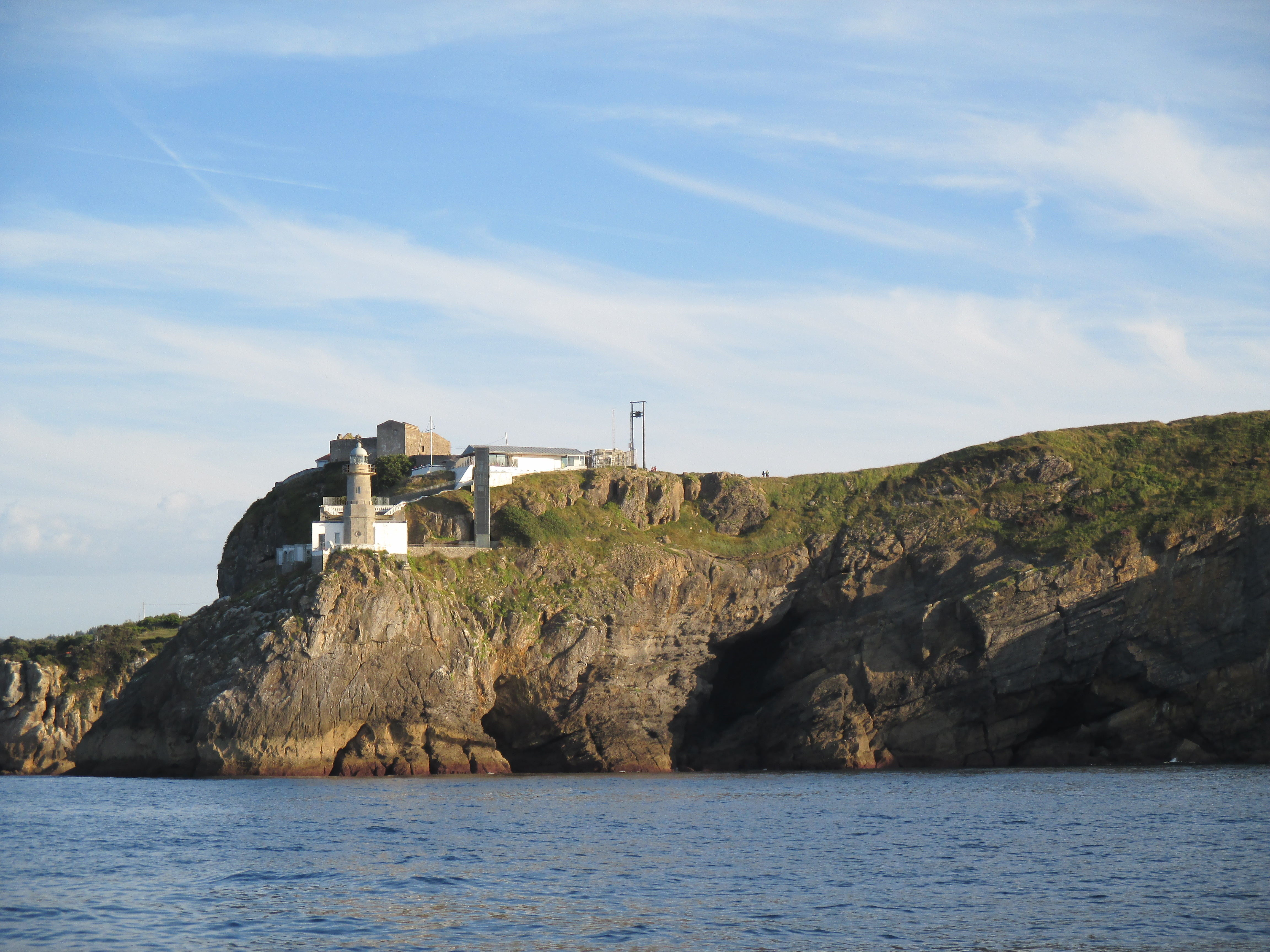 Antzoriz lurmuturra (Lekeitio) mendebaldetik. Argazkian ikus daitezke Santa Katalina baseliza, Lekeitioko itsasargia eta Antzoriz IV kobazuloa.